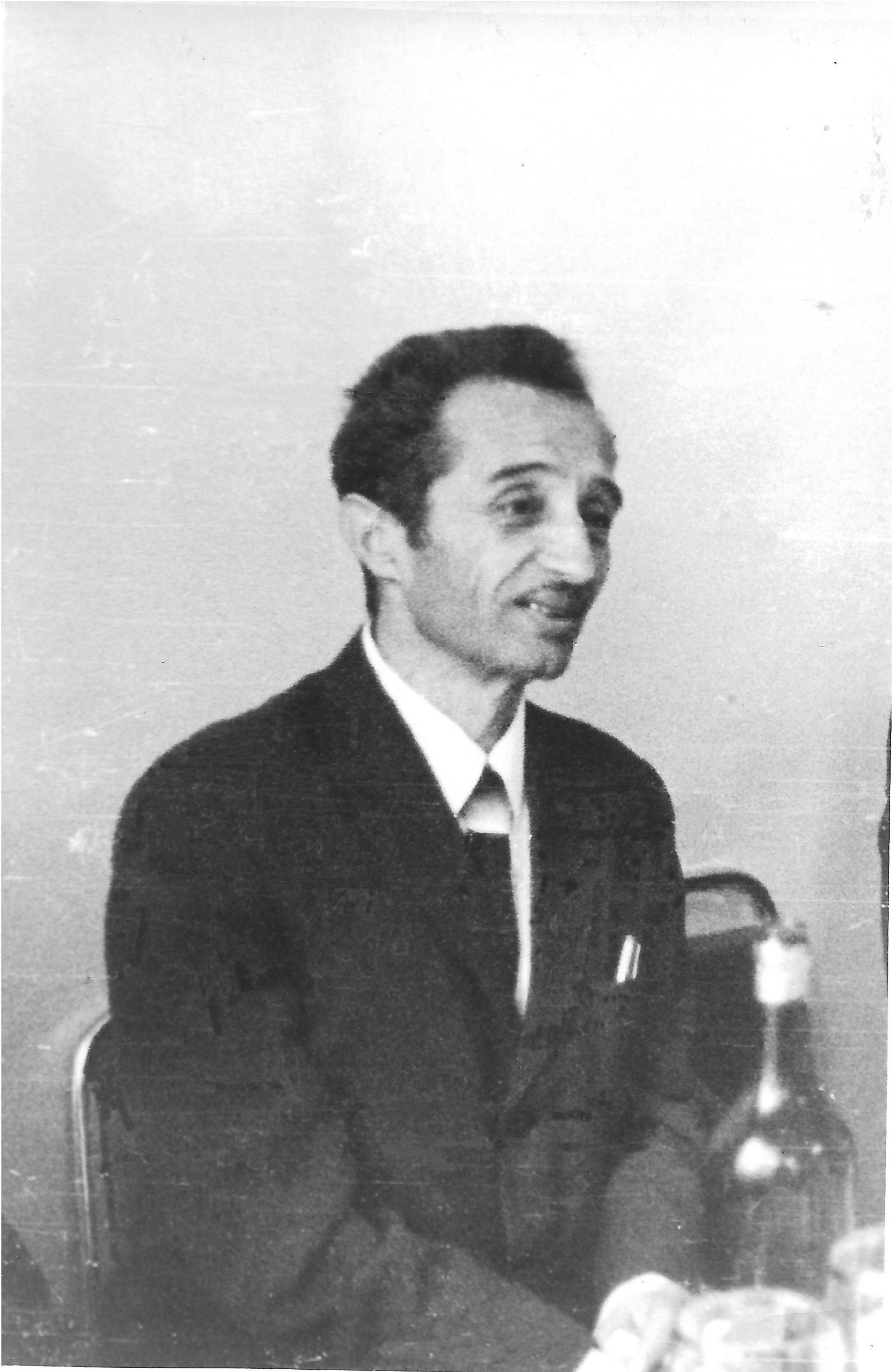 Пинхос Подрабинек — советский учёный, доктор биологических наук, физиолог, правозащитник. 23 апреля 1971 года, Москва.